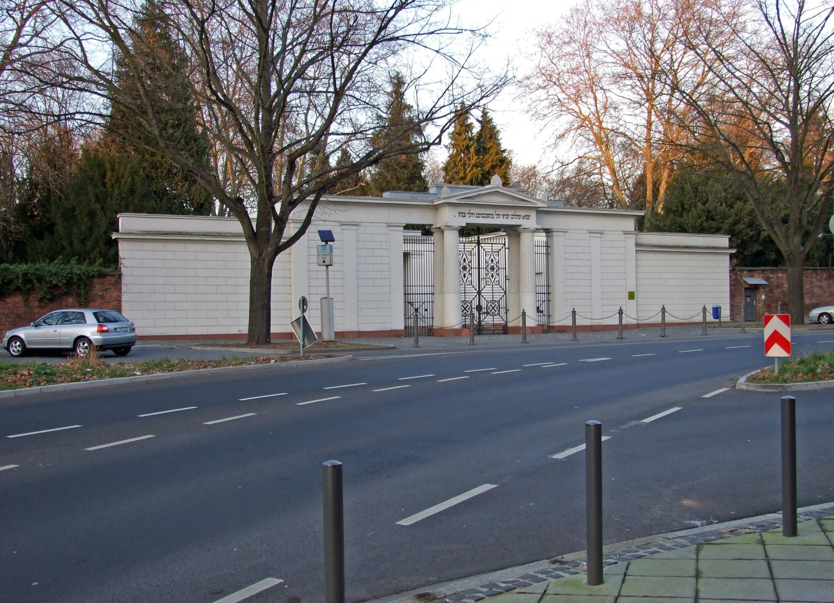 Portel zum juedischen Hauptfriedhof in Ffm